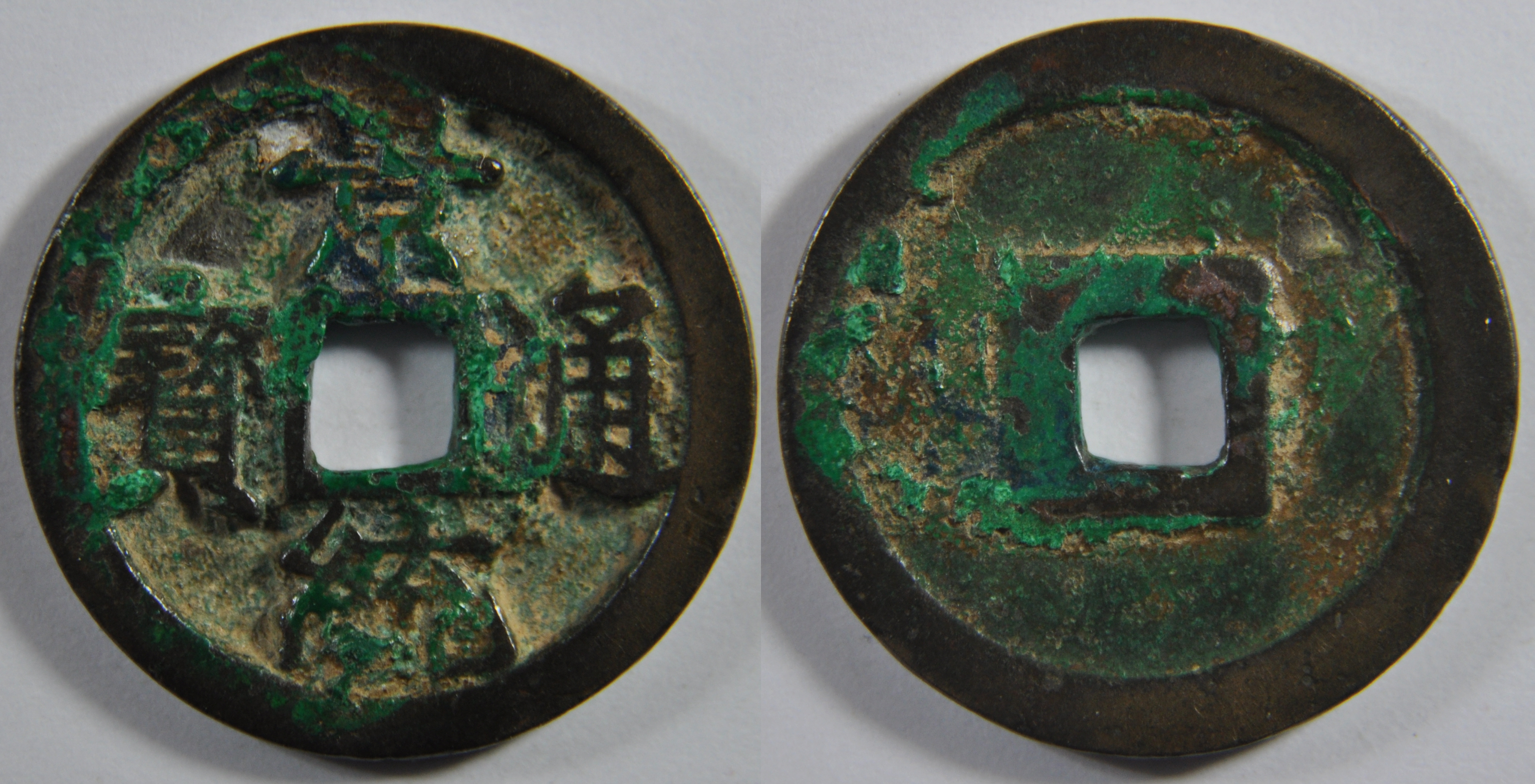 Une monnaie en bronze d'une sapèque de l'empereur Le Hien Tong (1498-1503), ère Canh Thong (1498-1503) de la dynastie des Le postérieurs (Nha Hau Le) qui a dirigé le Vietnam de 1428 à 1788. A l'époque, le pays s'appelait le Dai Viet. Cet empereur a vécu de 1461 à 1503. A/ Canh Thong thong bao (Monnaie courante de l'ère Canh Thong) R/ vide Dimension : 24,5 mm Poids : 5,05 g. Remarques : Il existe deux types de cette monnaie. Celle-ci appartient au type 1 qui a le caractère Canh (en haut) plus grand. Par contre les caractères bao (à gauche) et thong (à droite) sont un peu plus petits. Remarquez que le poids est plus élevé que la normale qui est autour de 3-3,5 g. Ici, le poids dépasse un tien (3,8 g.). C'est le fils de Le Thanh Tong et d'une fille de la famille Nguyen. Il n'a pas régné longtemps. Il a surtout publié un ouvrage sur le code légal. La fin de son règne marque le début de la crise du XVIe siècle qui va durer 88 ans. Références : 518 BNF (Catalogue des monnaies vietnamiennes, François Thierry, 1988), Mitchiner NIS 4478 Indice de rareté : TC (Très Commune)